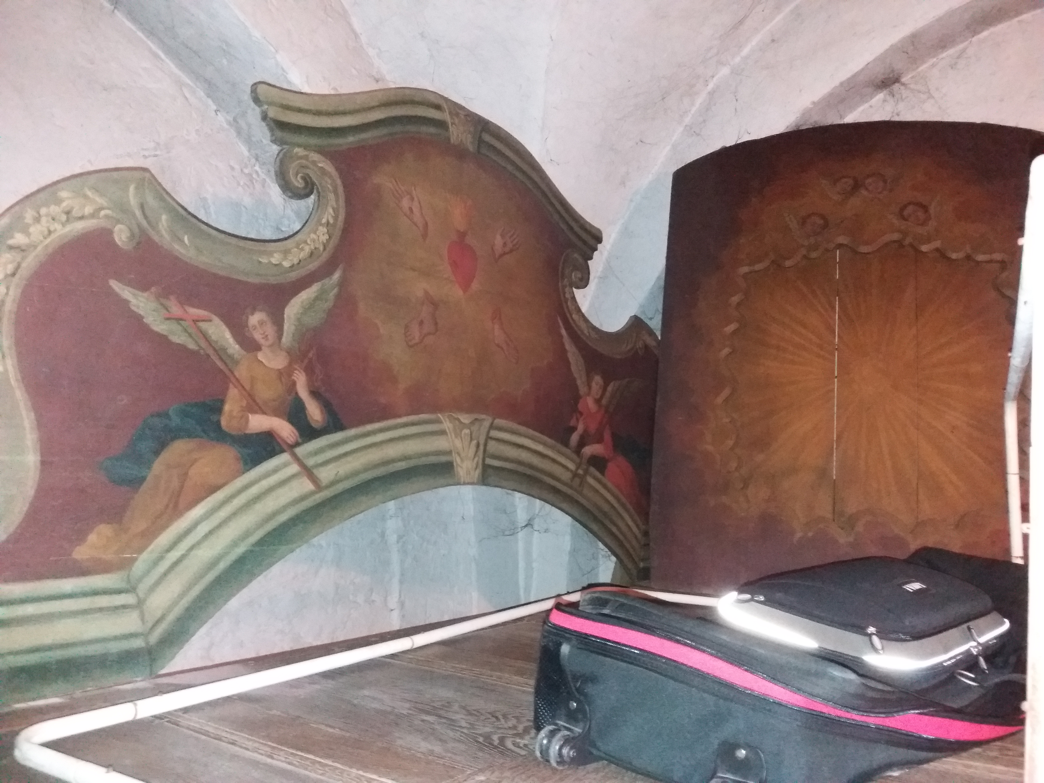 Malerei Im Turm von St. Magnus Everswinkel